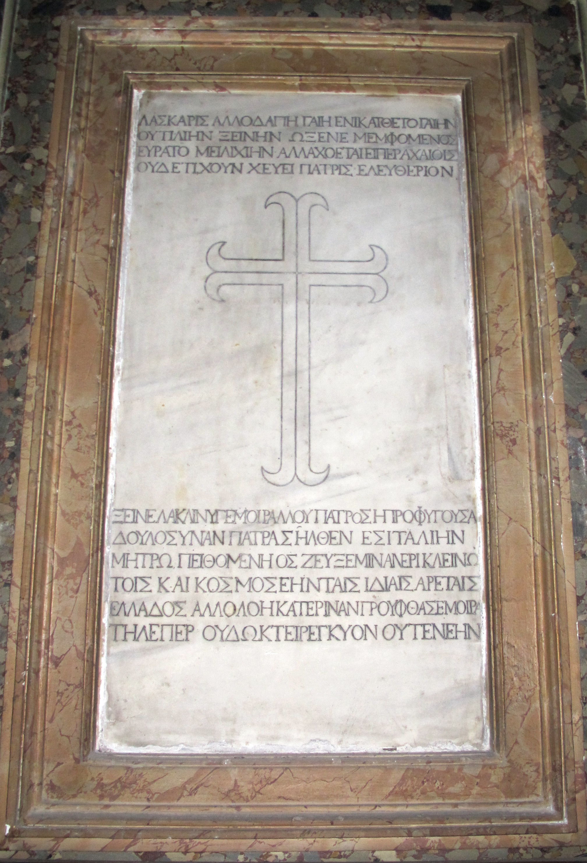 Sant'agata dei goti, iscrizione funebre di giovanni lascaris (m. 1535)